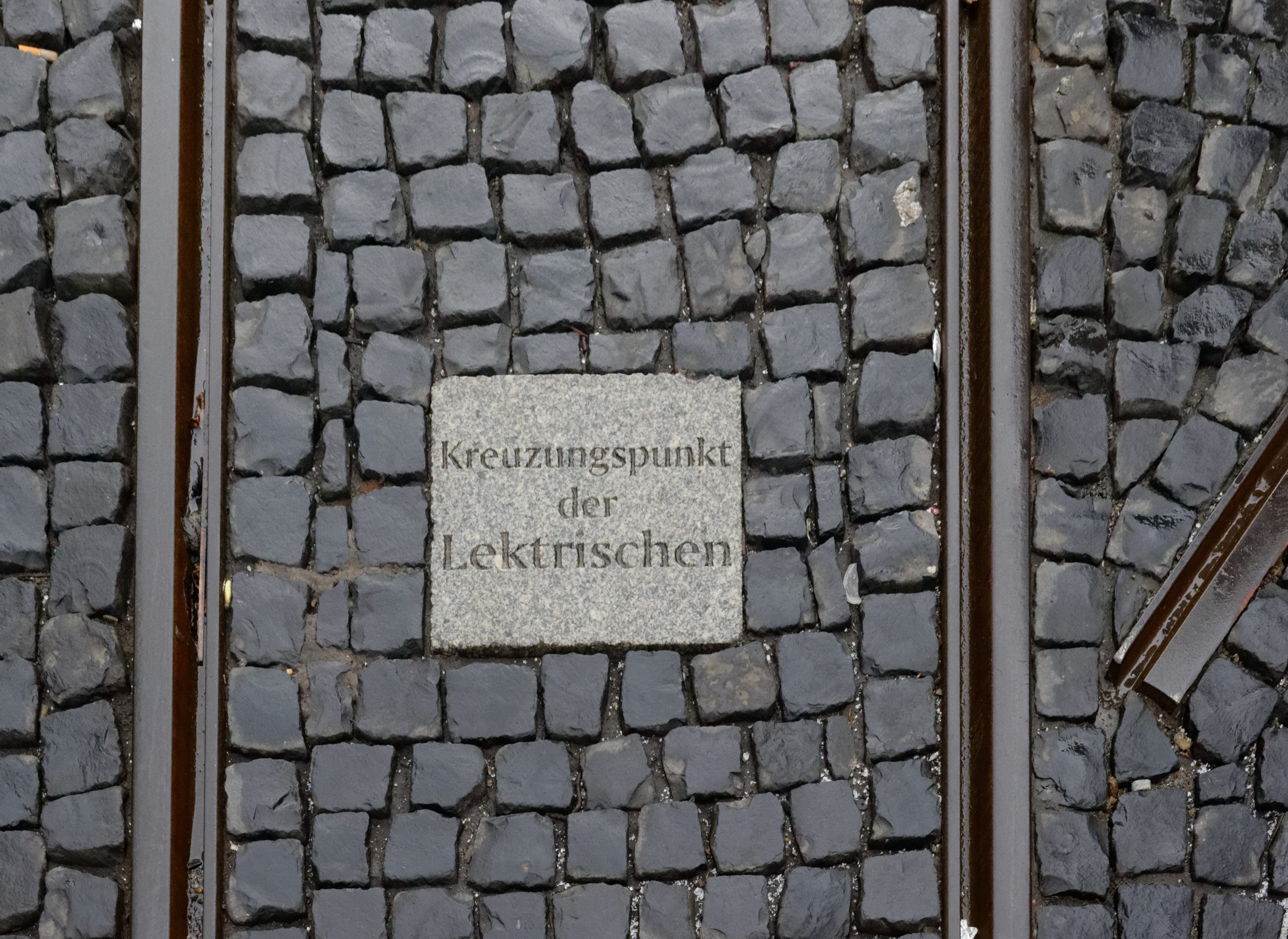 Remscheid Straßenbahn am Markt